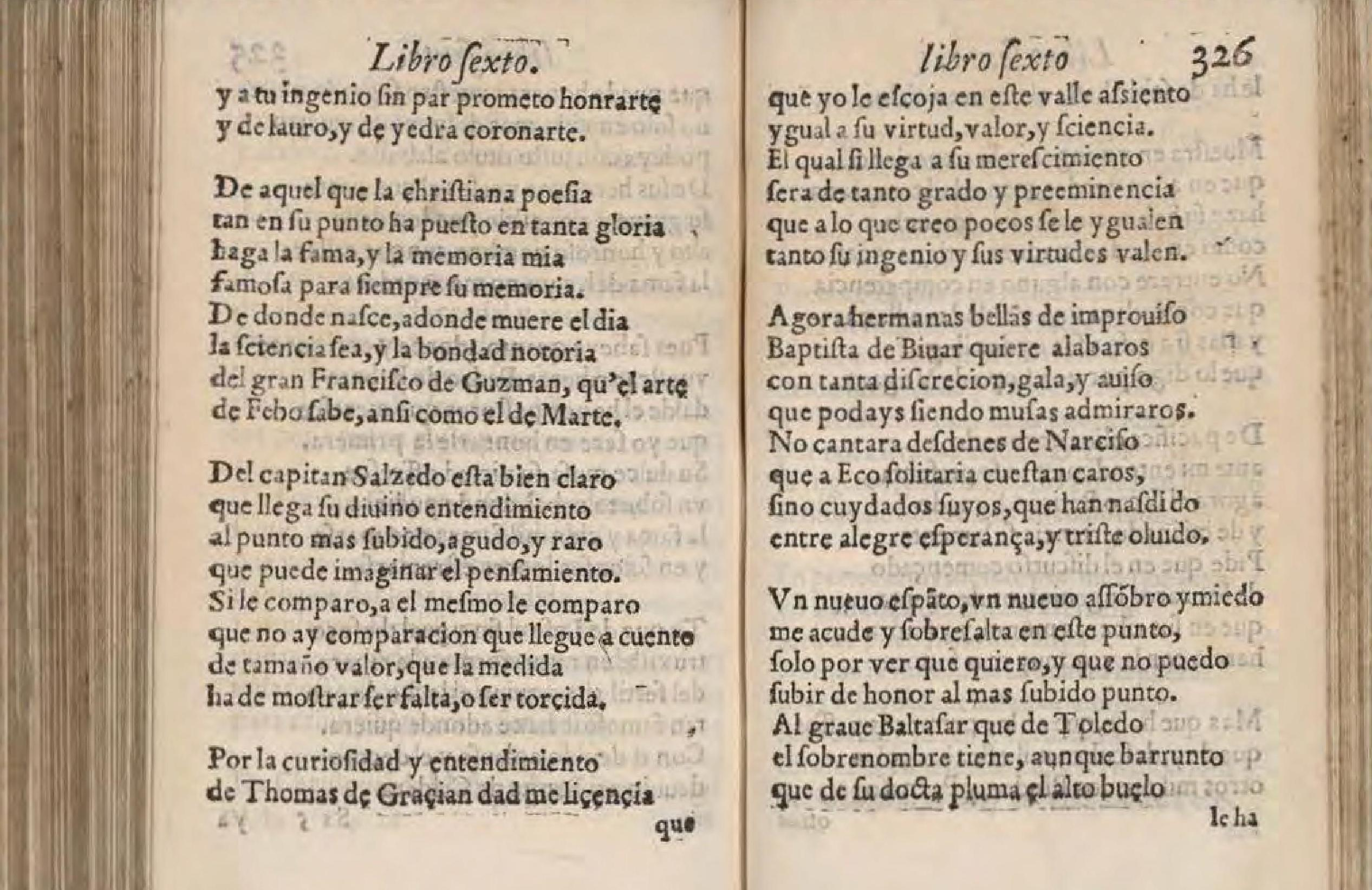 La Galatea de Cervantes, 1585; página 326, en la que aparece nombrado Juan Bautista de Vivar.